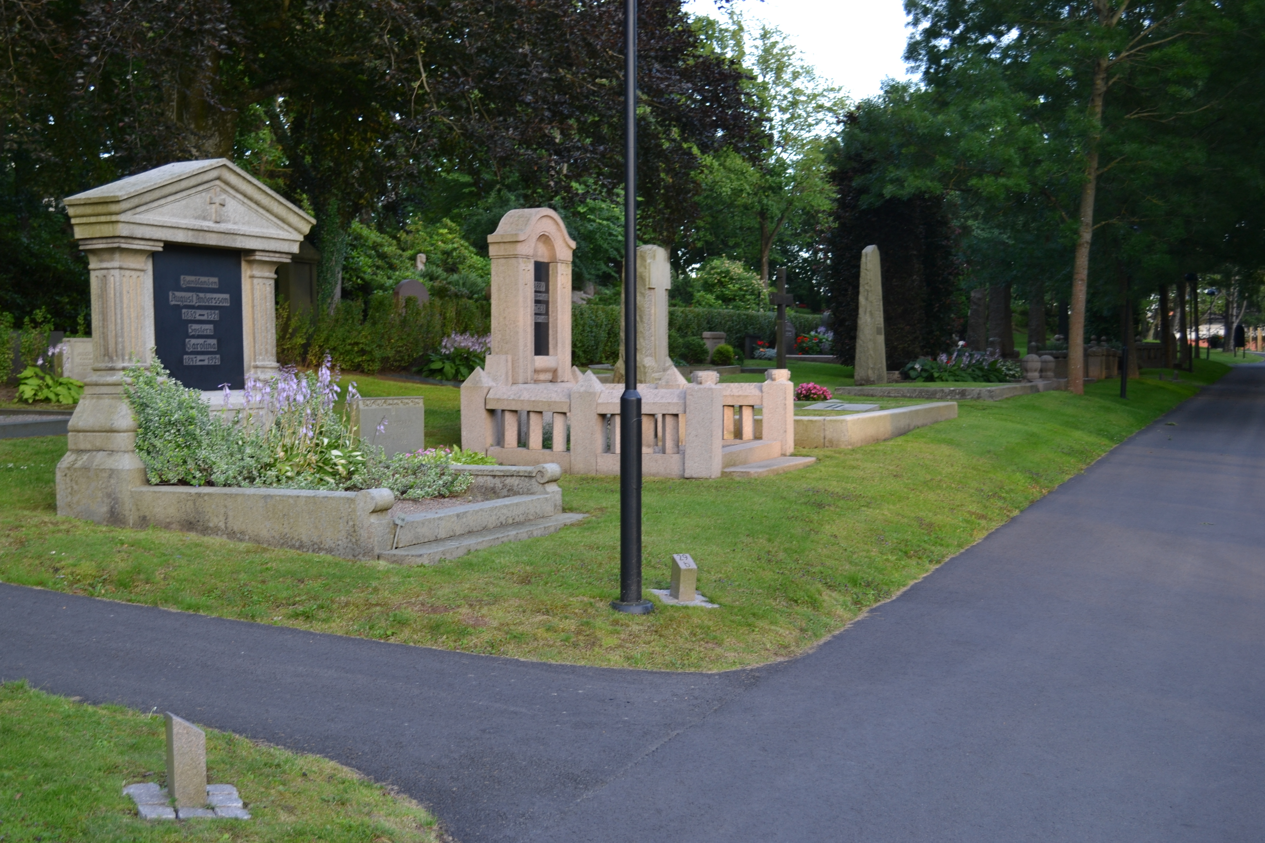 Sankt Jörgens kyrkogård, Varberg.